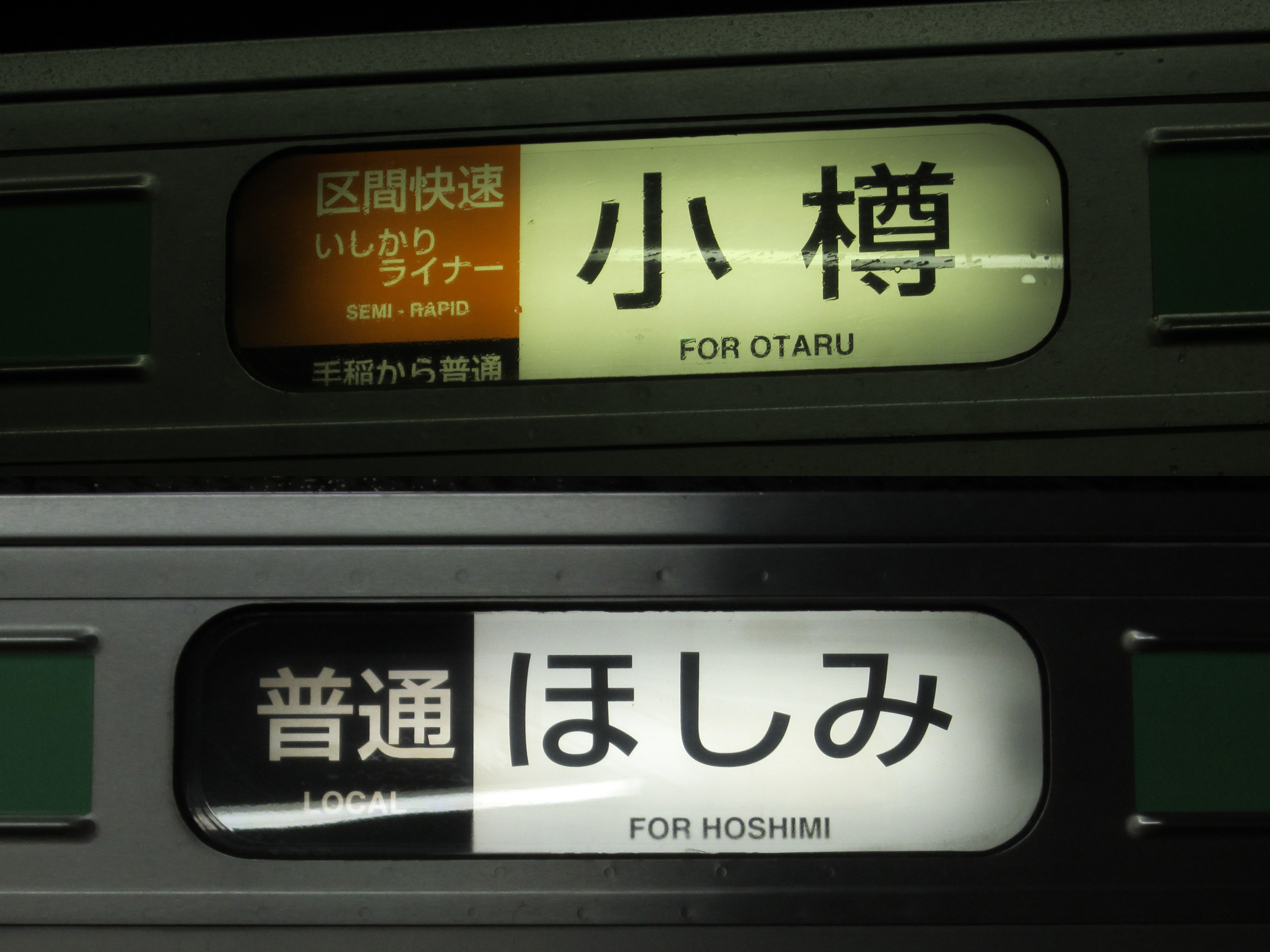 JR北海道721系電車側面方向幕